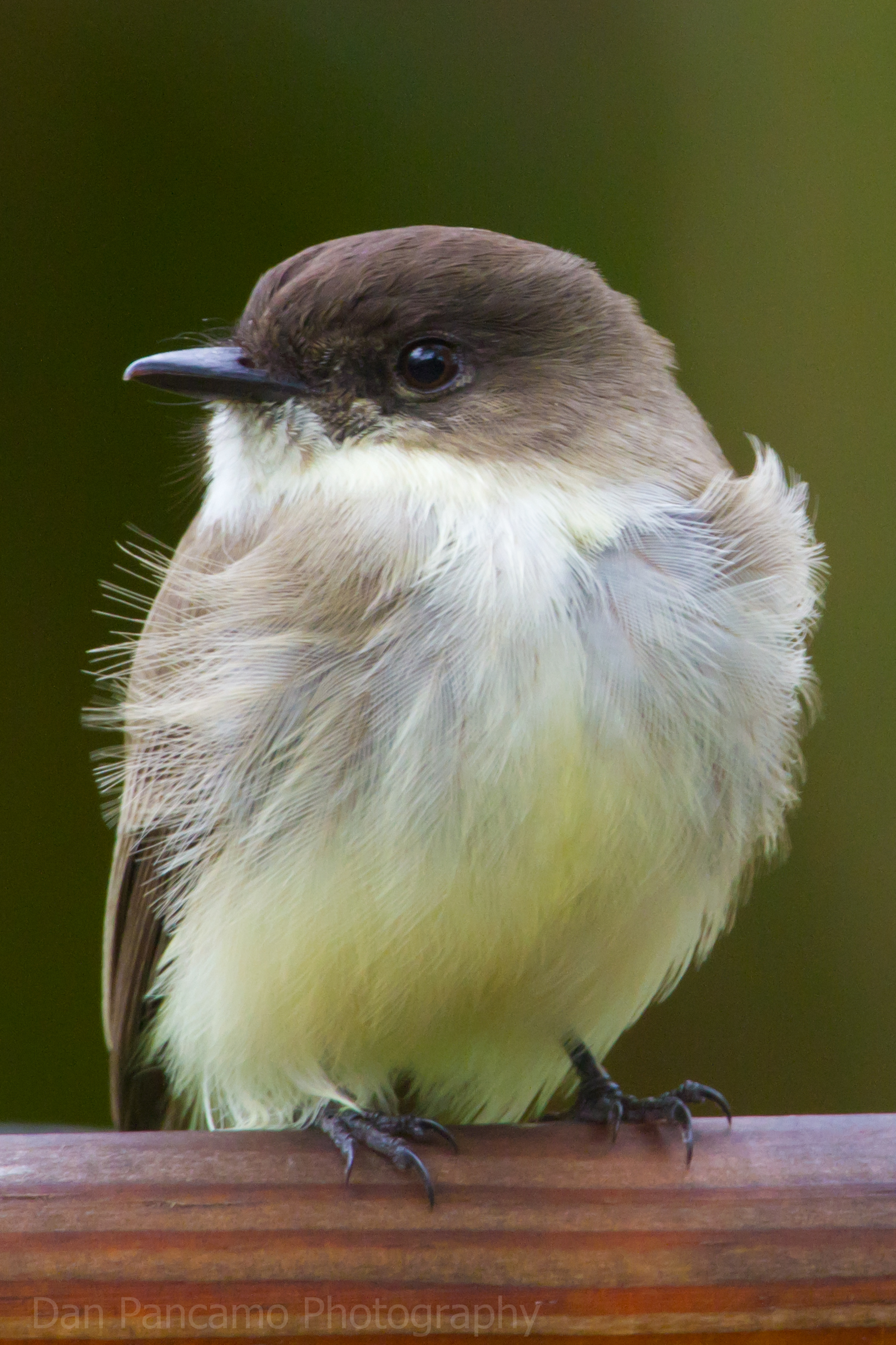 Eastern Phoebe